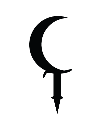 kartoreno, zbran